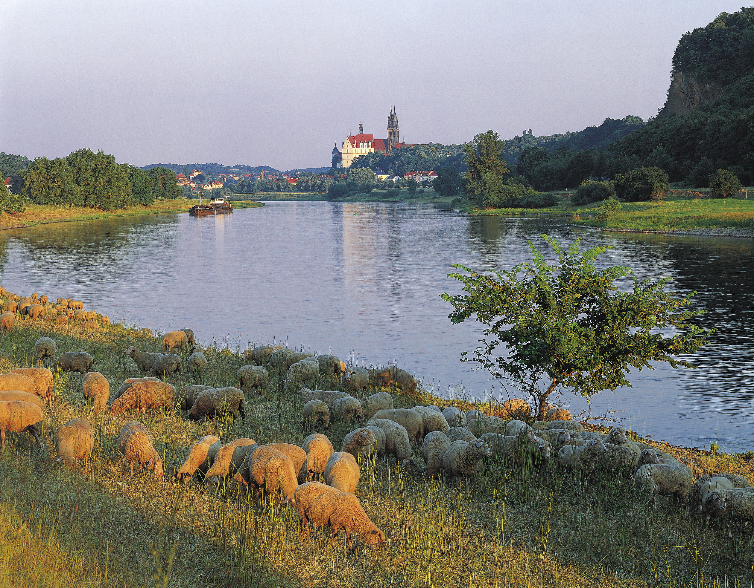 Abendstimmung an der Elbe bei Meißen mit Blick auf die Albrechtsburg. Das Bild wurde vom rechten Elbufer aus flussabwärts in der Gemeinde Diera-Zehren aufgenommen.